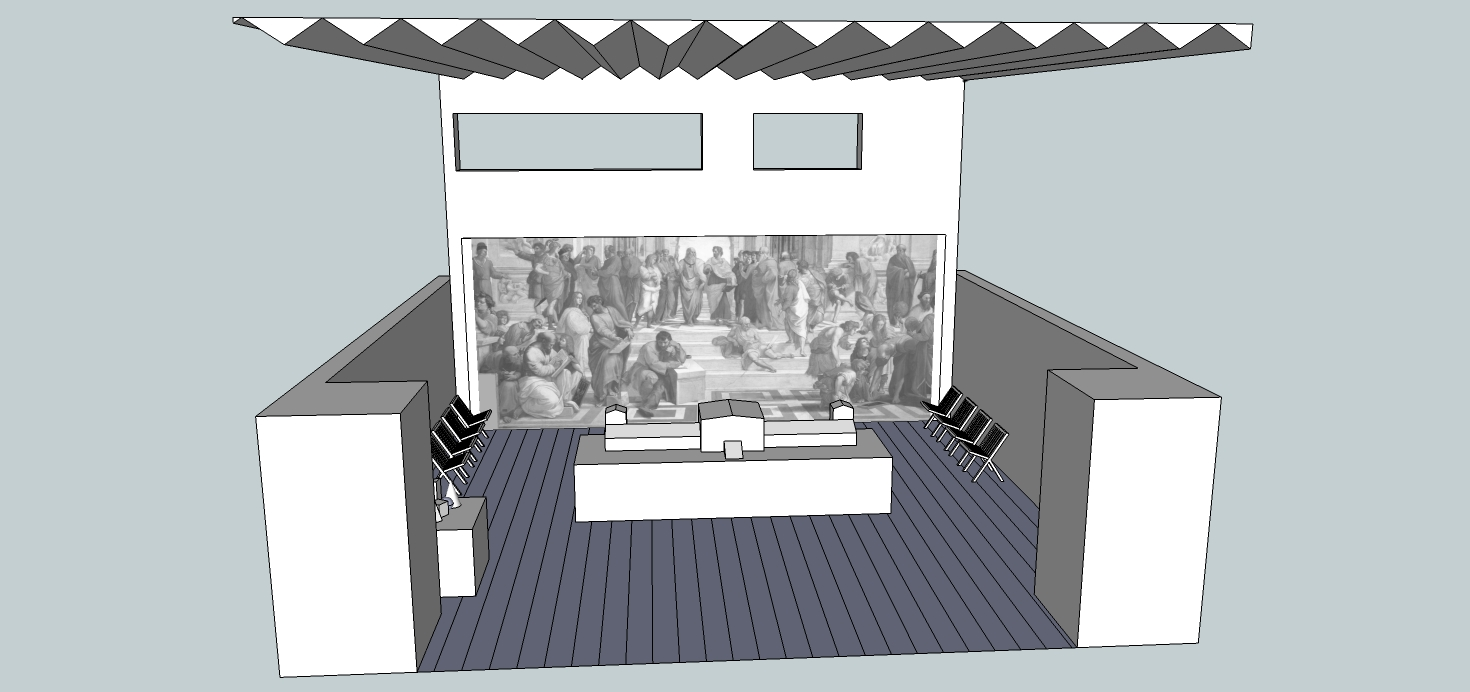 Vista prospettica della sala mostra Architettura-Idea, progettata da Luca Meda e presentata all'interno della mostra Il progetto di architettura alla XVI edizione della Triennale di Milano